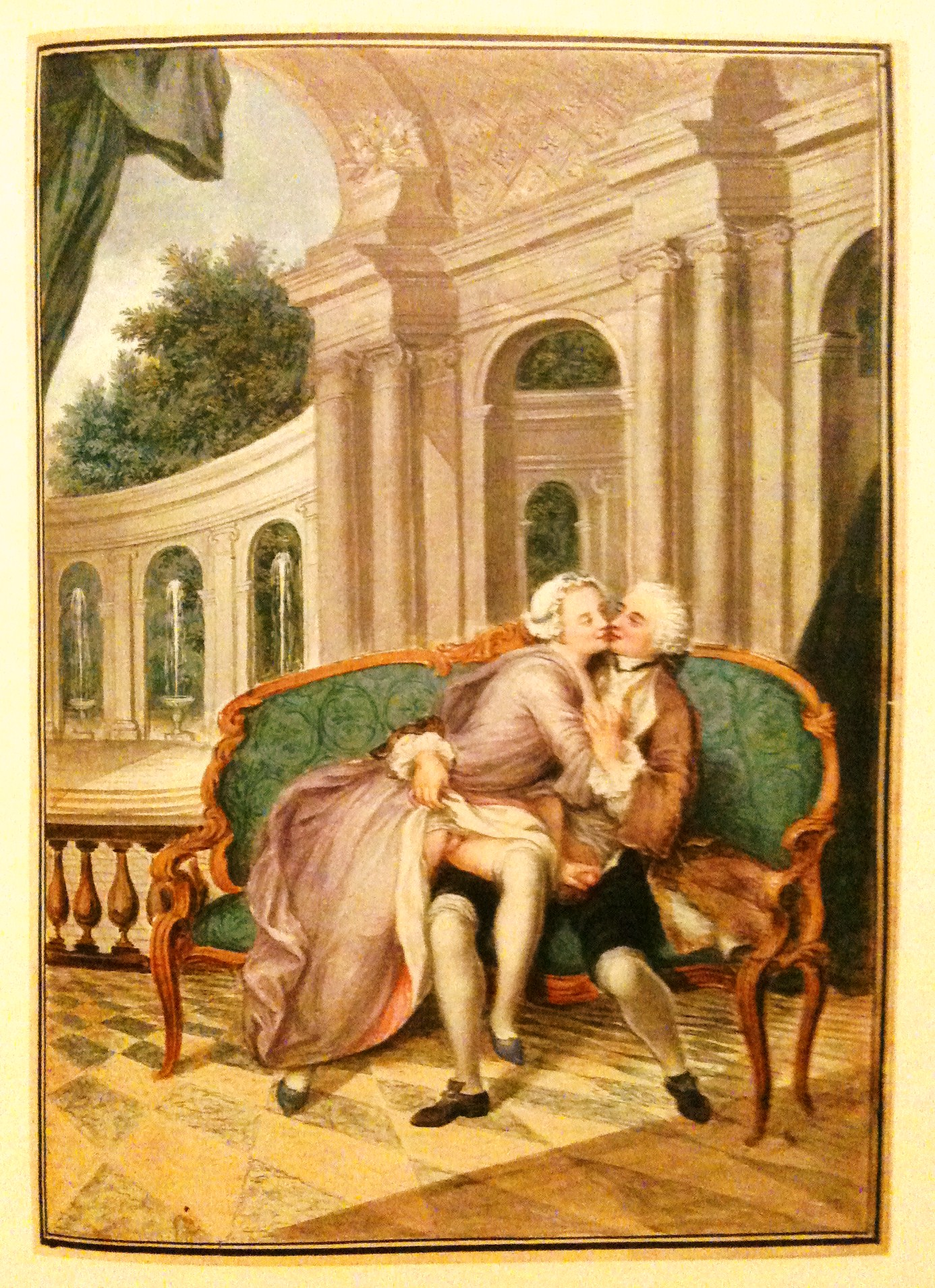 L'une des 20 planches [recadrée] illustrant les Tableaux des mœurs du temps dans les différents âges de la vie par La Pouplinière publiés à Paris en 1750 à 2 exemplaires chez l'imprimeur Bonnin. Gouache, aquarelle, mine de plomb. Dim. : 256 x 194 mm. Auteur présumé : Alexandre Antoine Marolles.